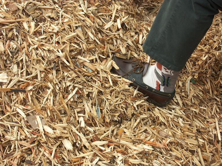 Flis til energigjenvinning